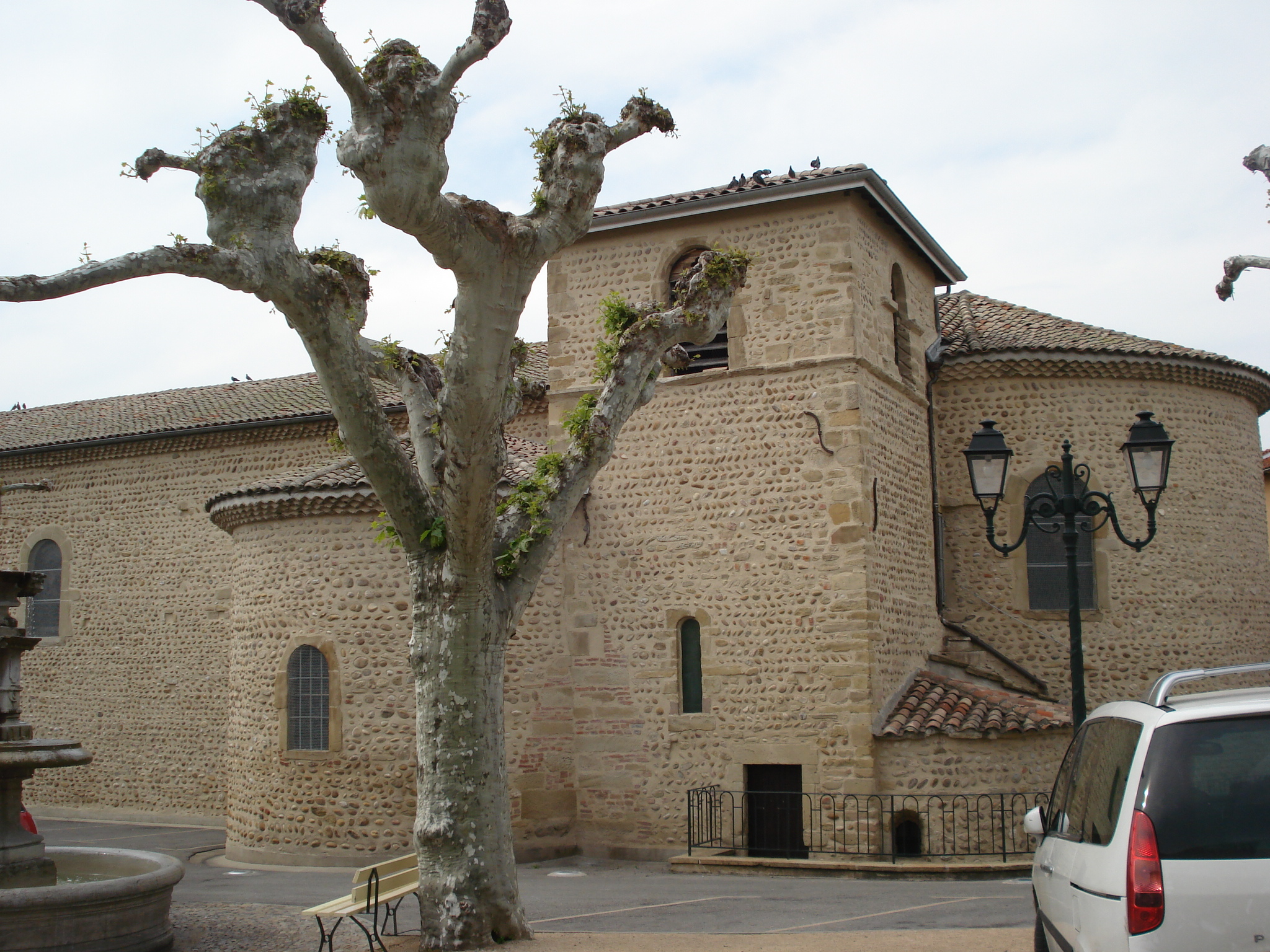 église Saint Saturnin du XIIème siècle à Saint-Sorlin-en-Valloire dans la Drôme